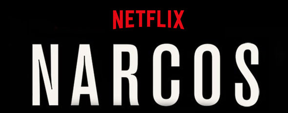 Logo de la serie